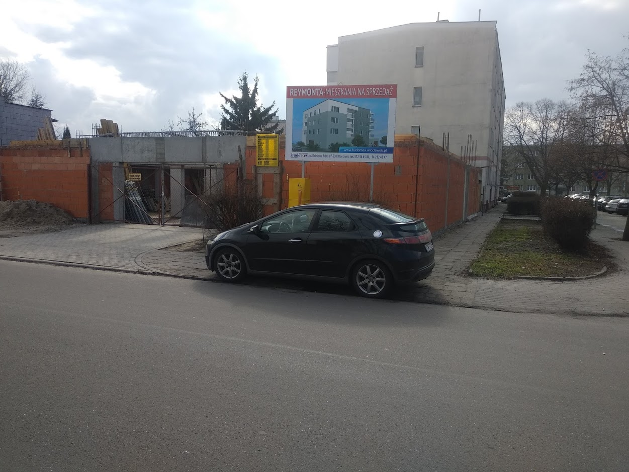 Budowa bloku przy Reymonta 17B (2020 r.)